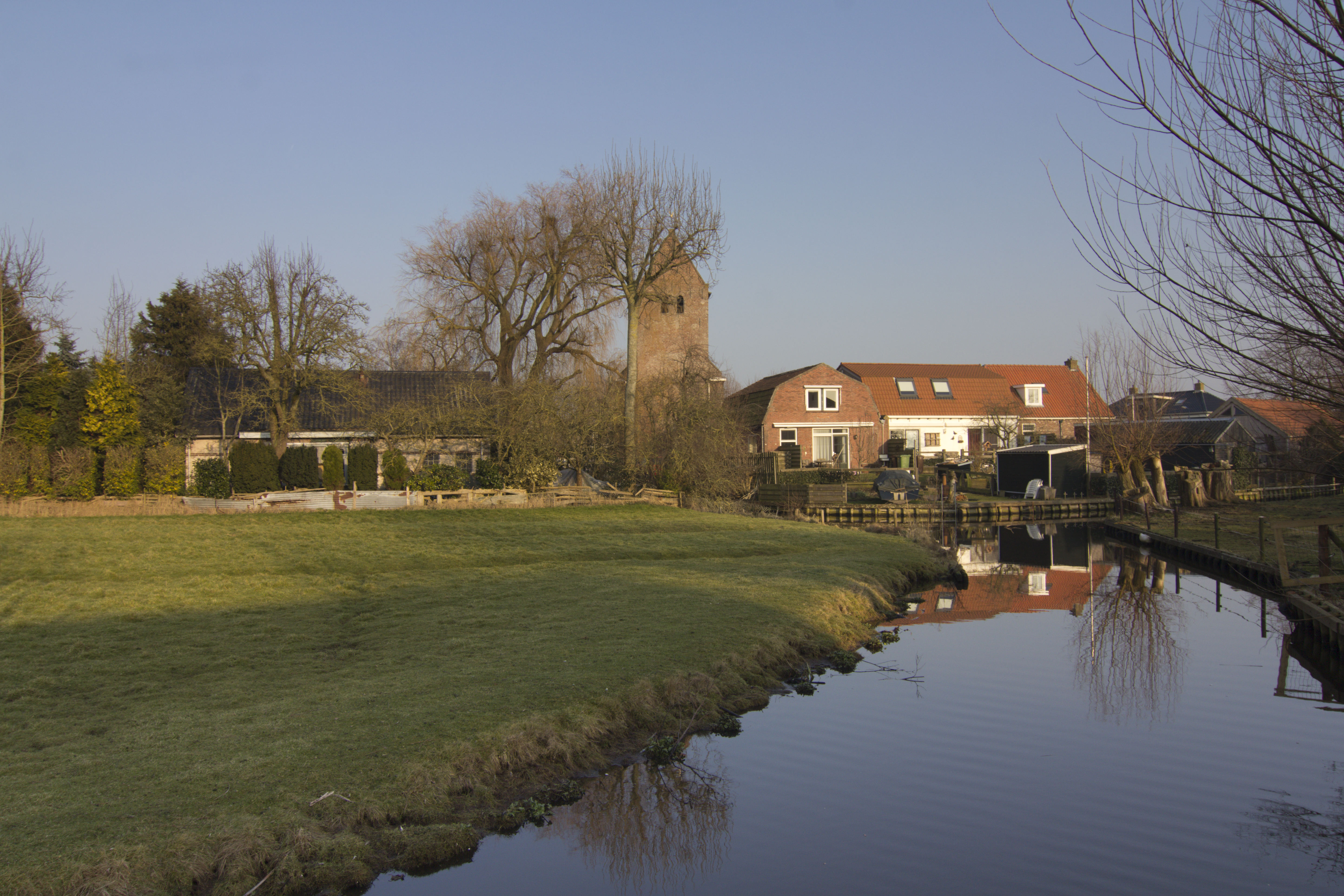 8722 Molkwerum, Netherlands